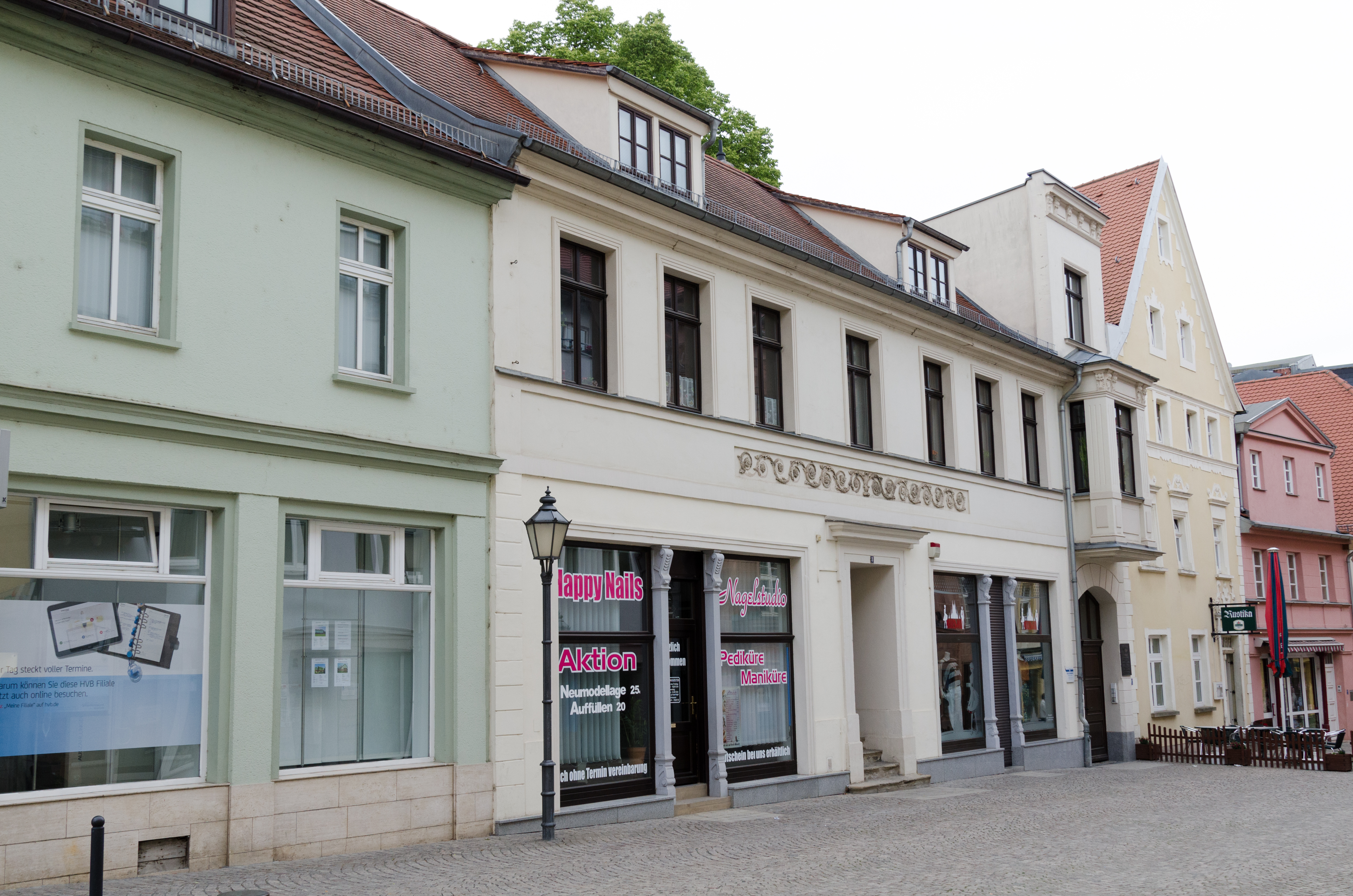 Zeitz, Judenstraße 8